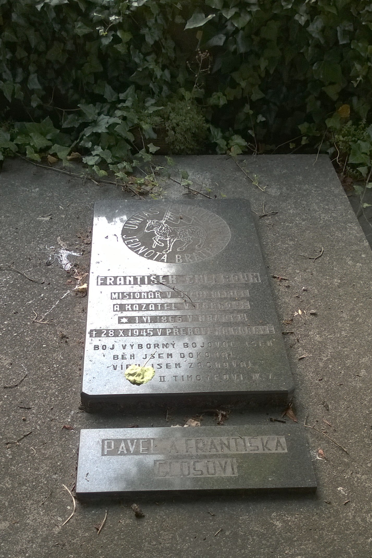 Náhrobek dvou kazatelů Ochranovského sboru v Turnově, F. Chlebouna a Pavla Glose.